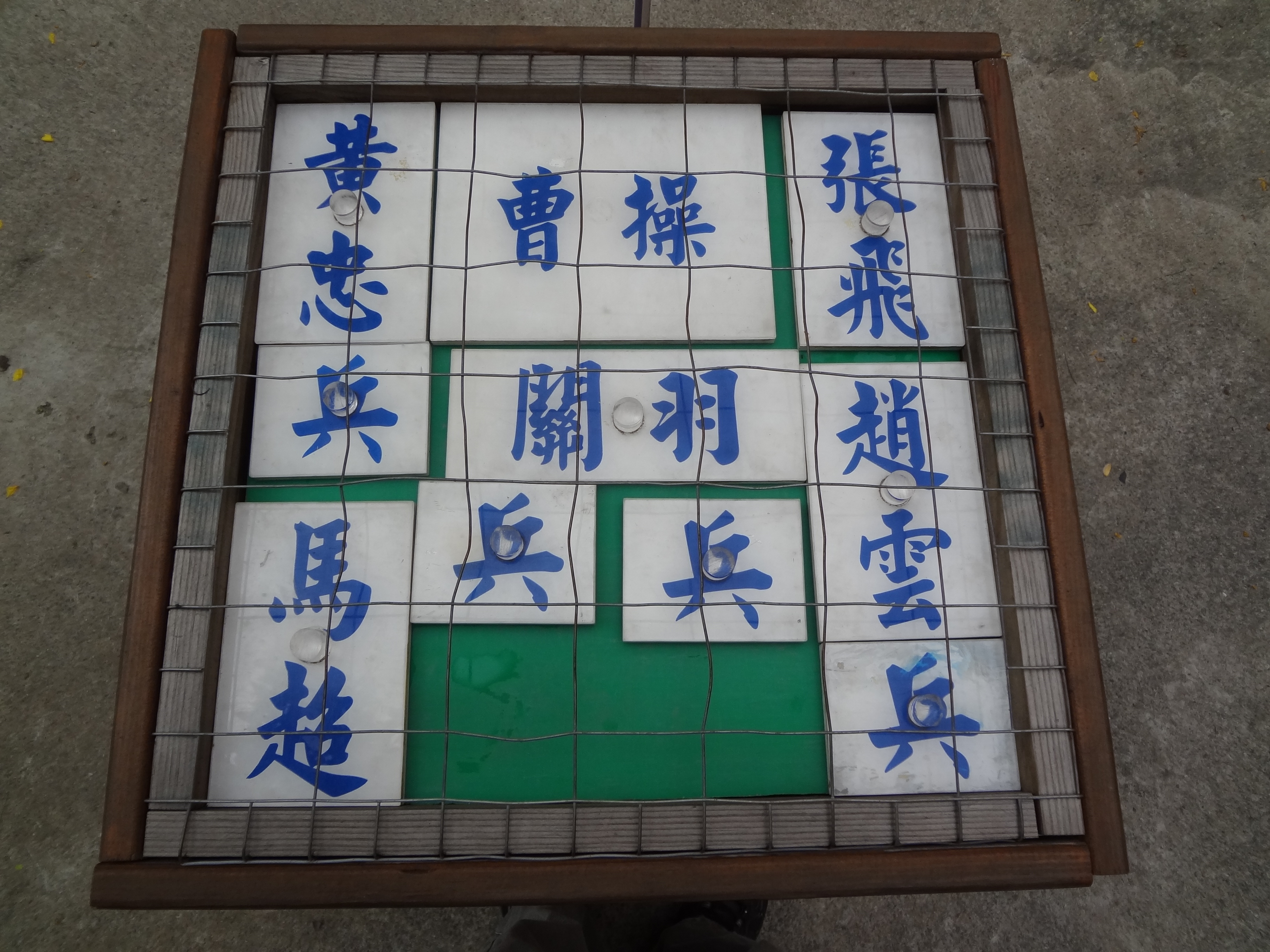 中文（台灣）: 2013年6月15日，新北市立三和國民中學的華容道。